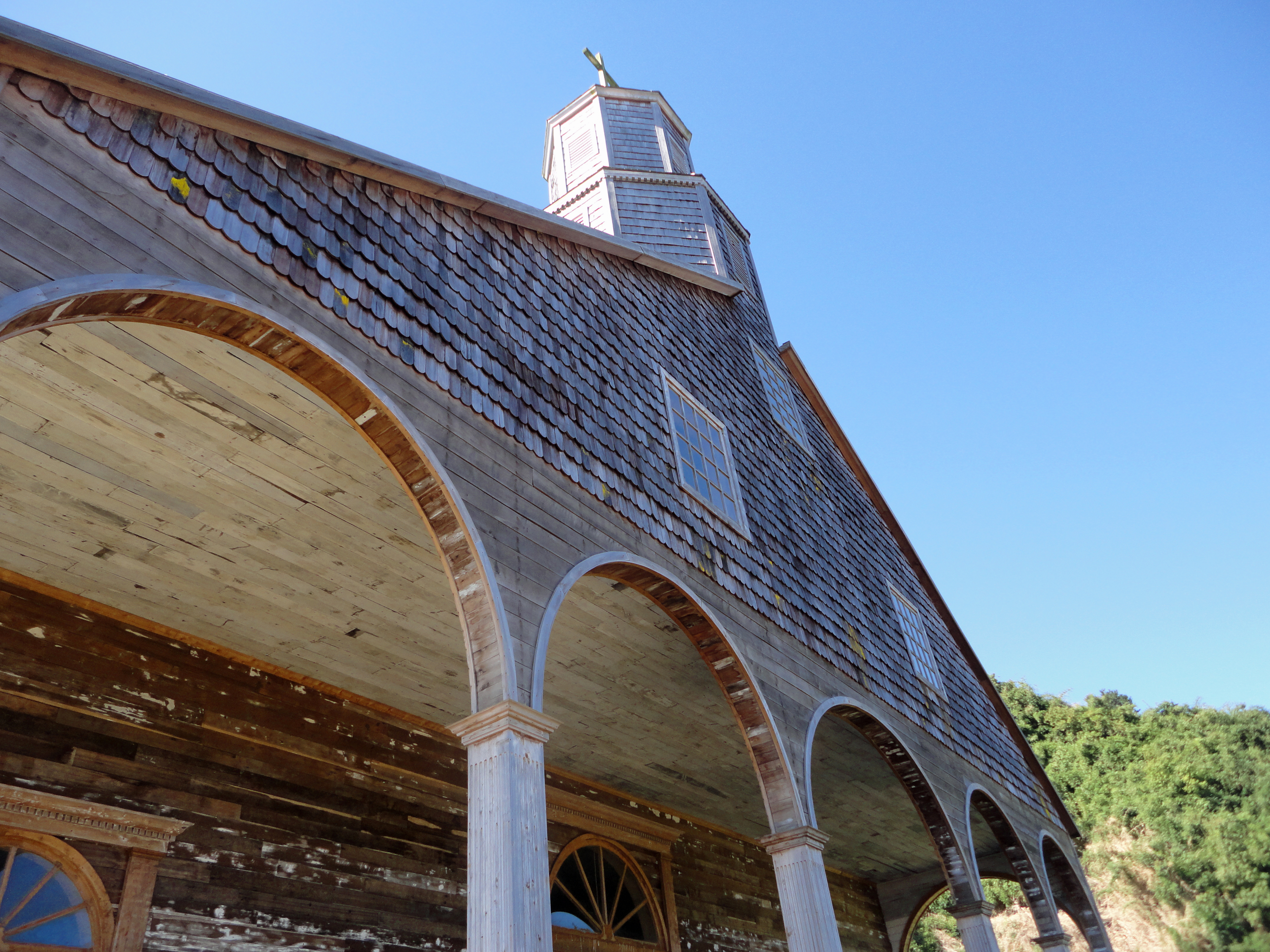 Arcos de la fachada de la iglesia de Quinchao This is a photo of a national monument in Chile: 703